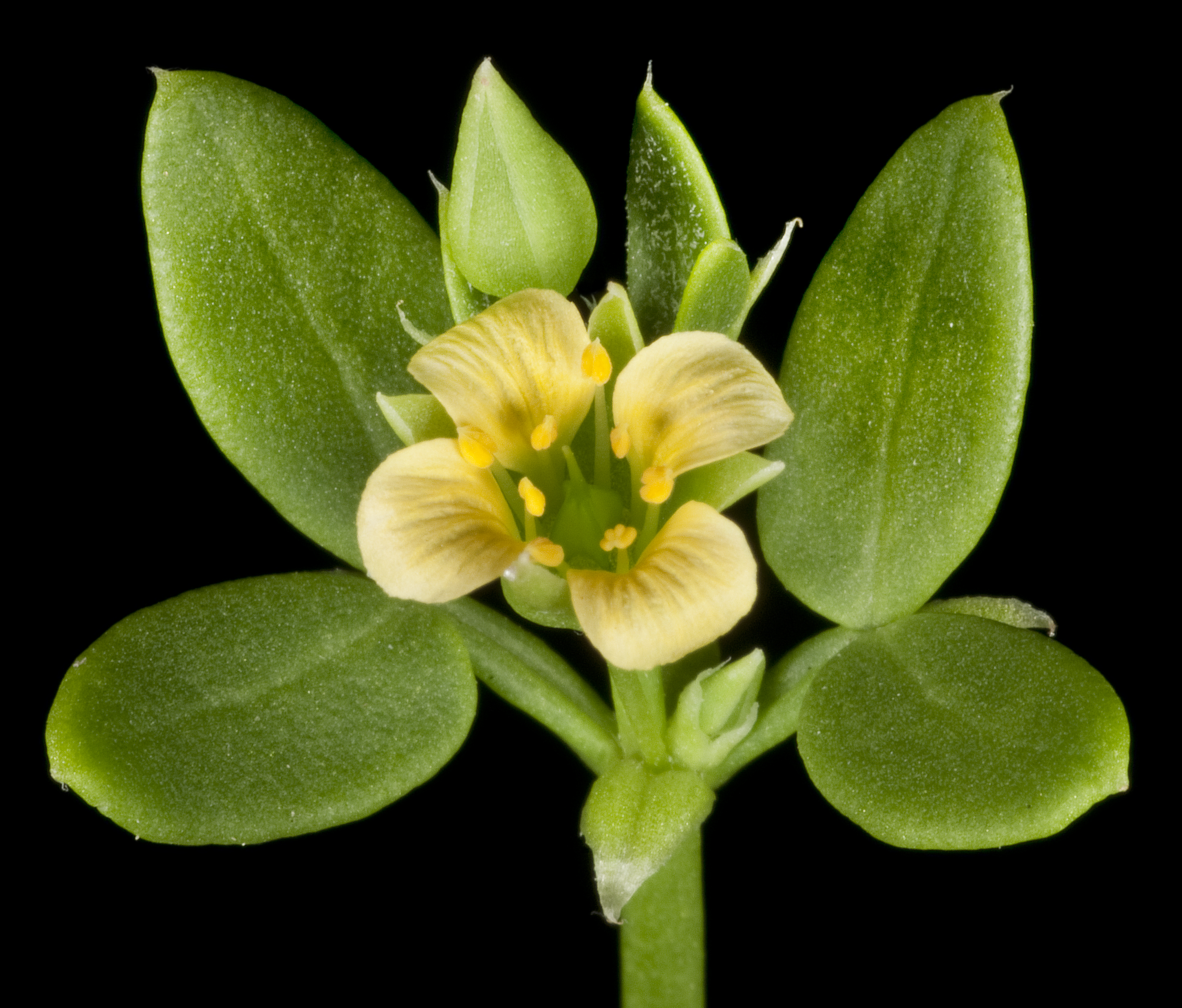 KRT4638